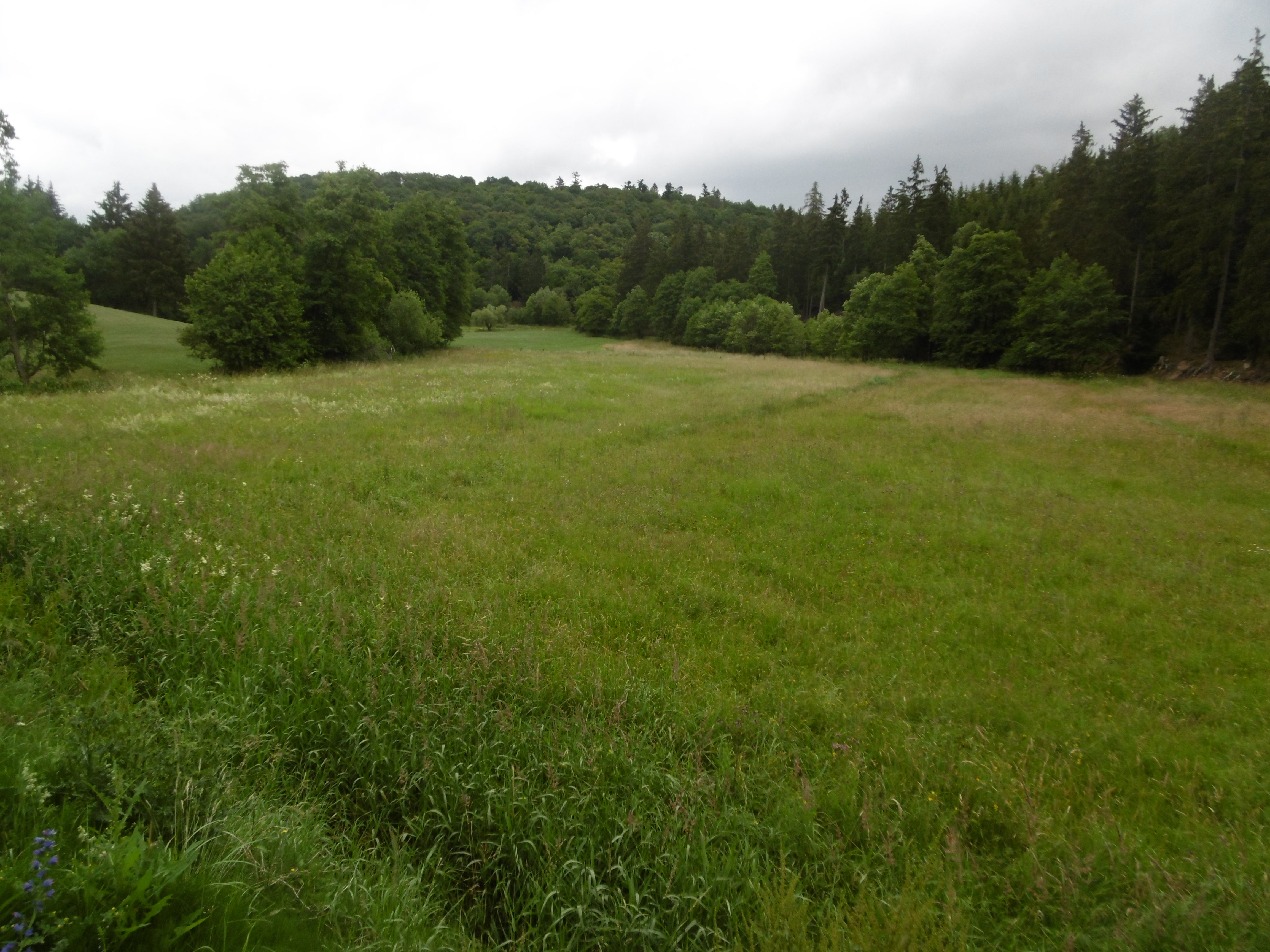 Südliche Ende vom Naturschutzgebiet Brühnetal; Wald gehört zum LSG Medebach.